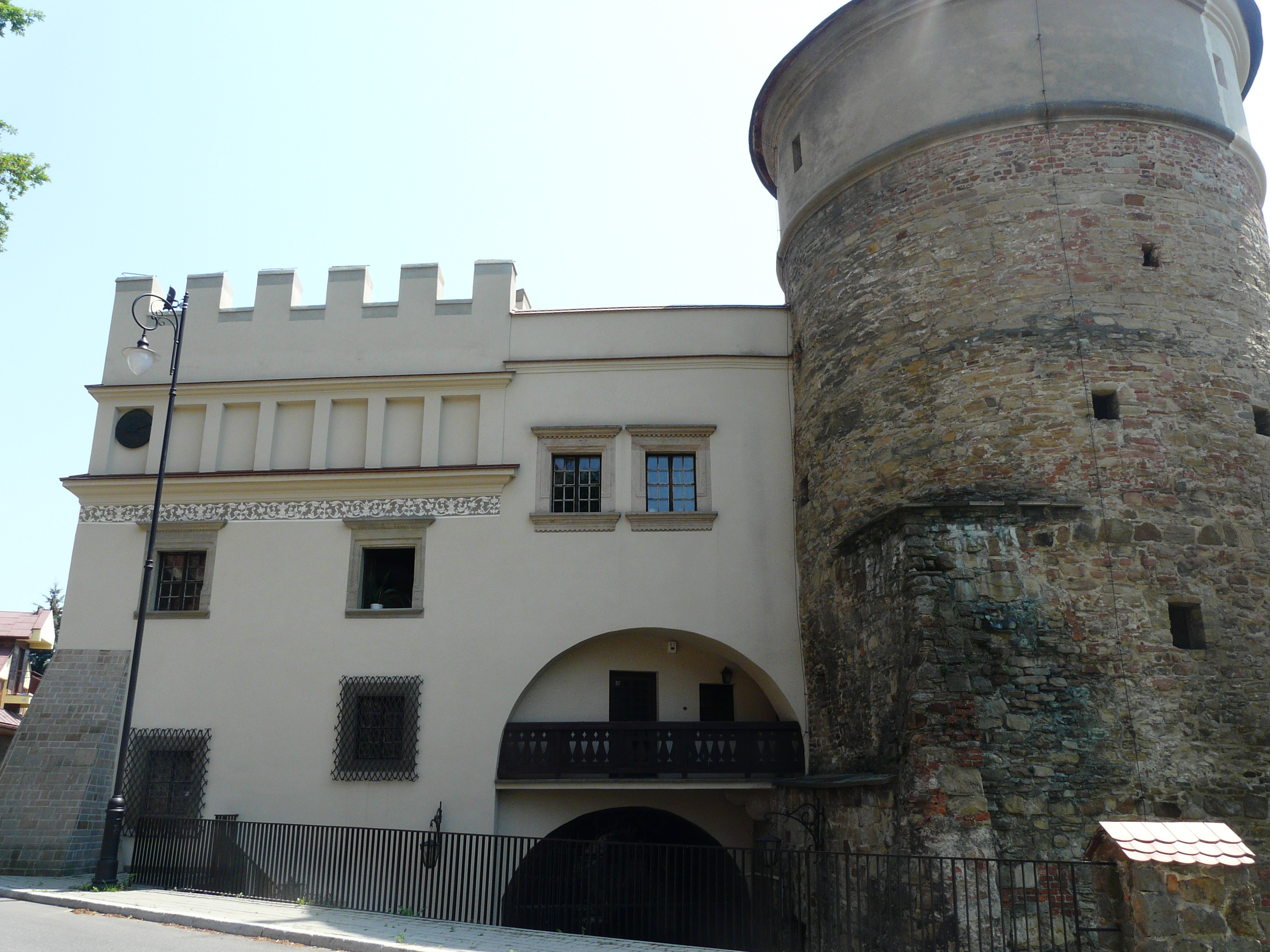 Muzeum Ziemi Bieckiej - Oddział w Domu z Basztą